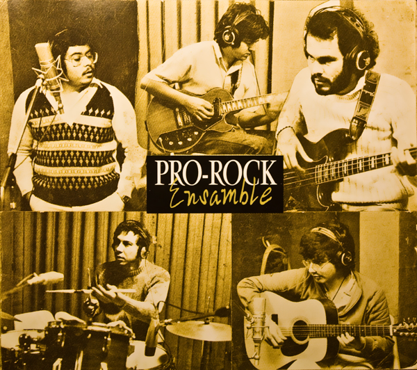 Integrantes banda Pro Rock Ensamble